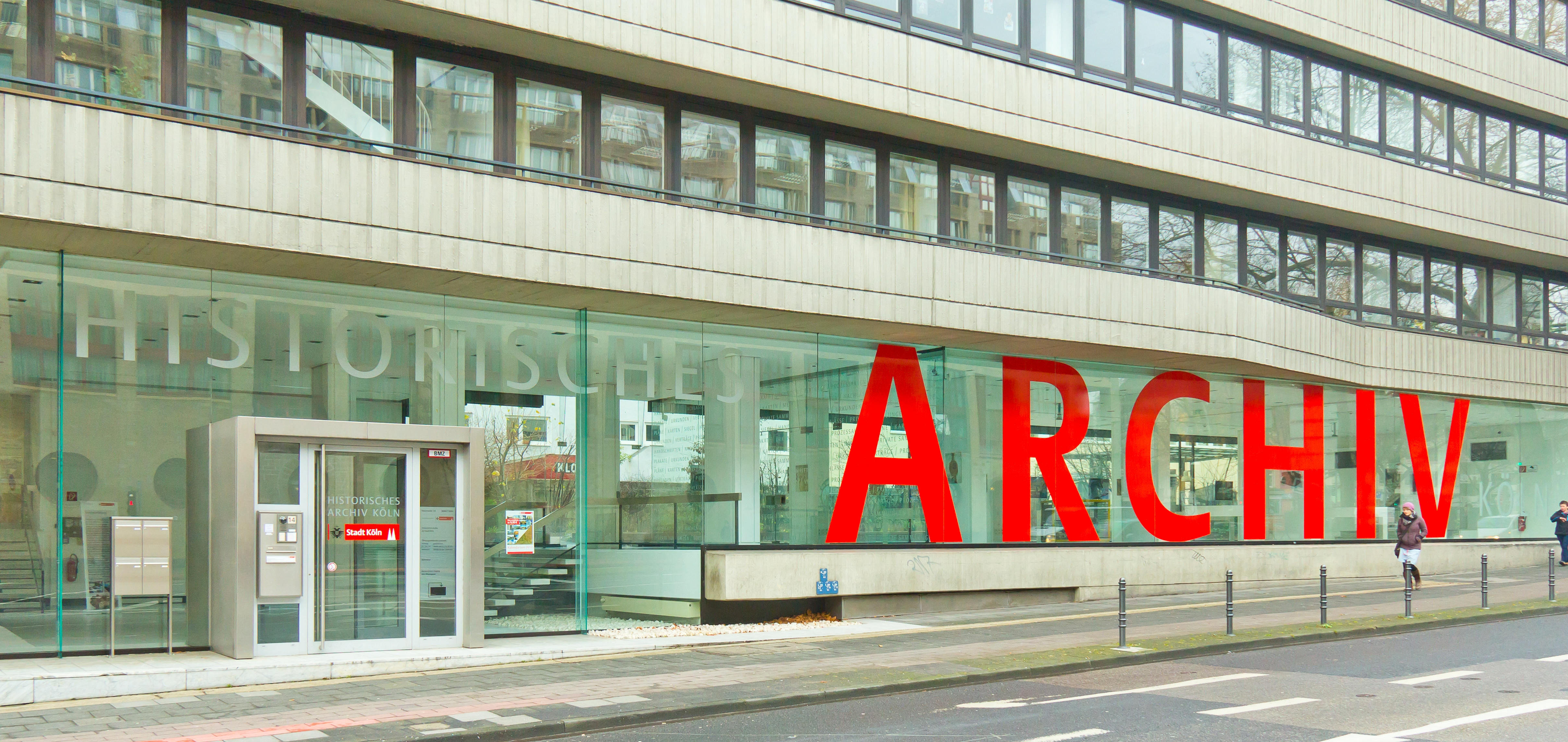 Historisches Archiv der Stadt Köln am Heumarkt 14, Köln. Nach dem Einsturz des Archivgebäudes am Waidmarkt/Severinstraße befinden sich hier die Büros der Archivmitarbeiter, ein digitaler Lesesaal sowie eine Ausstellungsfläche